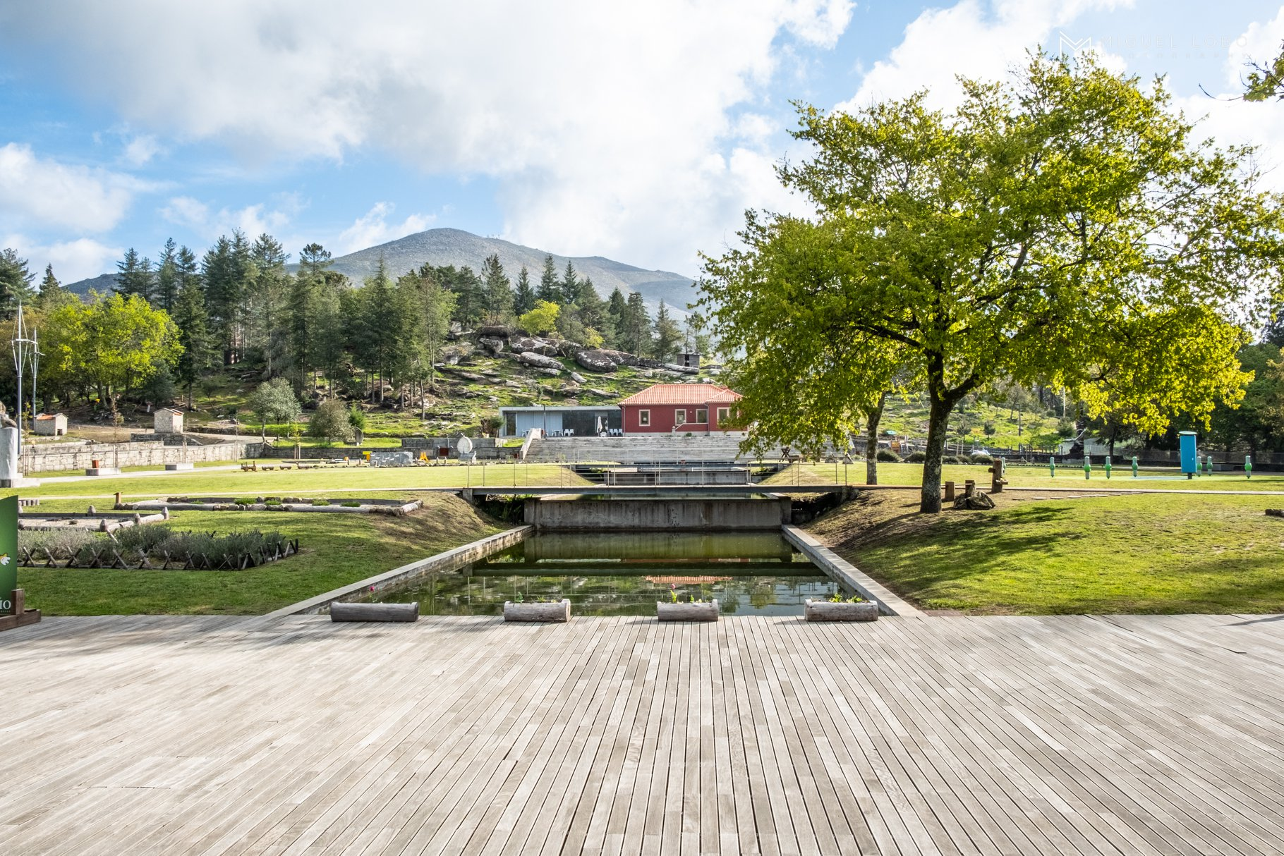 Porta de entrada na Reserva do Gerês-Xurés, no município de Arcos de Valdevez